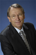 Berthold Gall, Landrat des Main-Taunus-Kreises